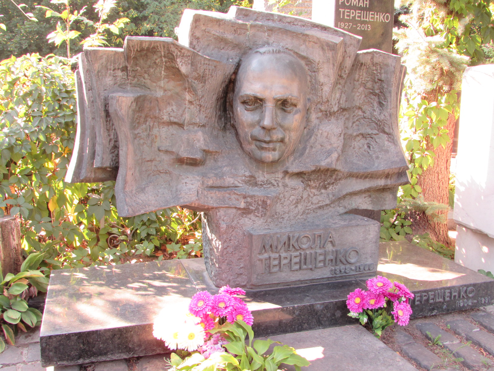 Могила письменника і поета М. І. Терещенка, Київ, вул. Байкова, 6, діл. 1